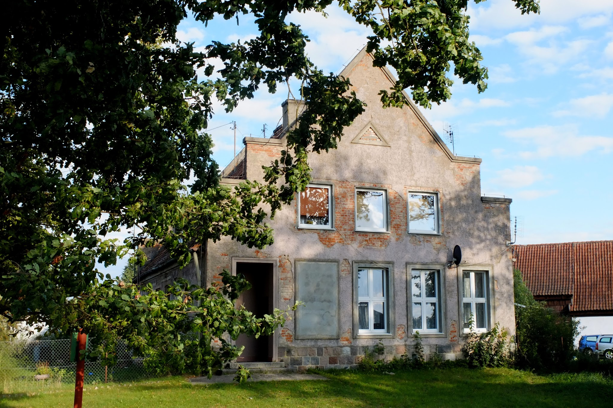 Czarkowy Grąd - budynek byłej szkoły z 1928 r.